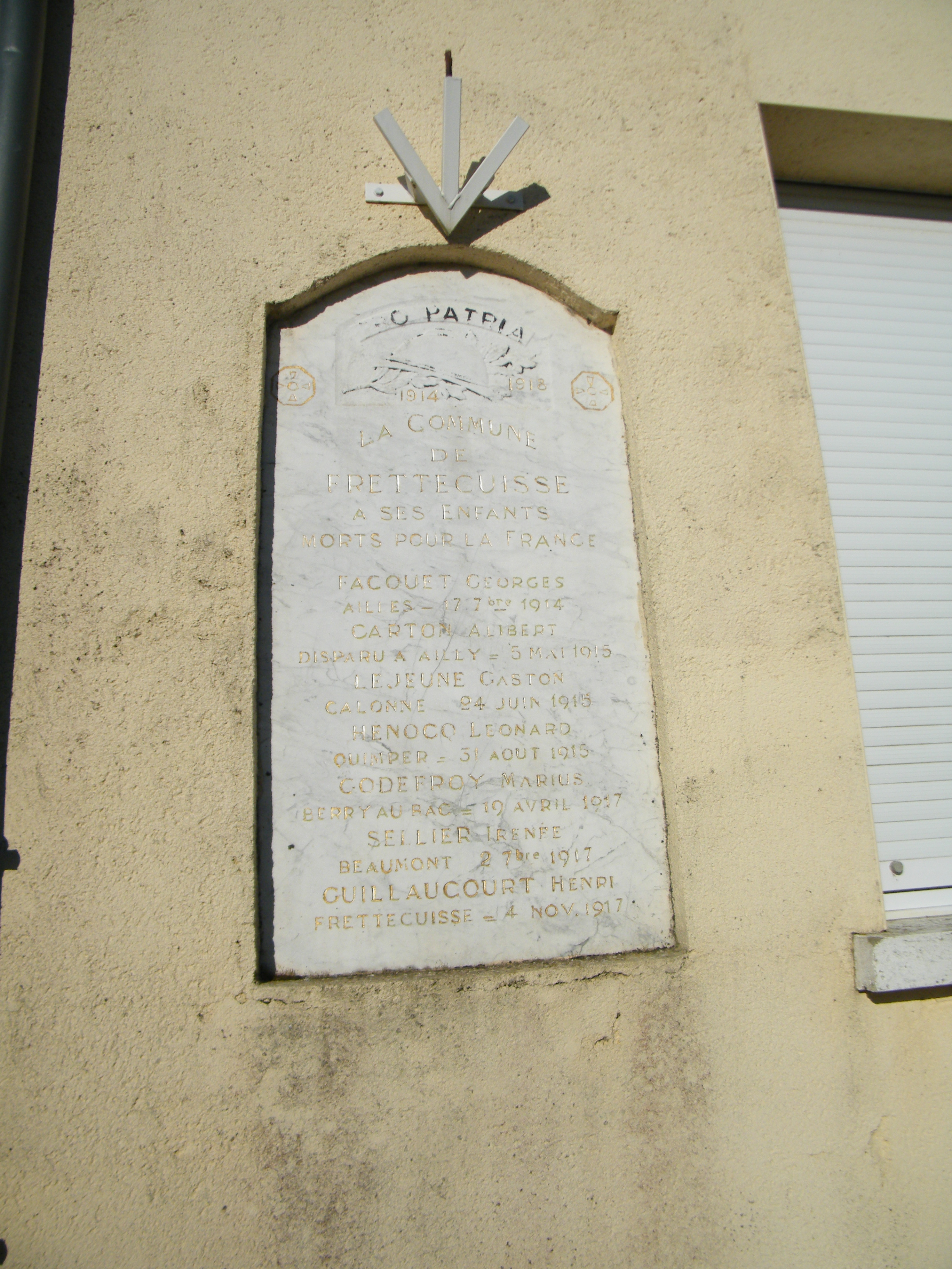 Frettecuisse, Somme, France, la plaque aux morts pour la patrie, 1914-1918.